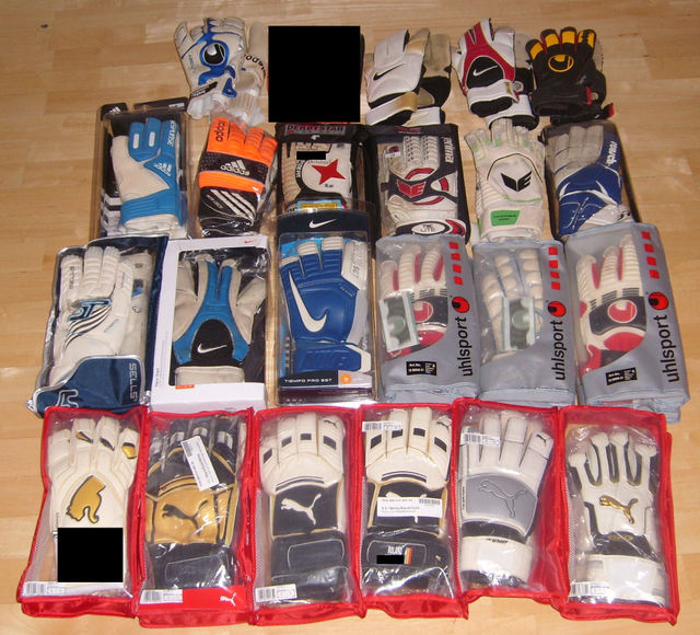 Torwarthandschuhe, verschiedene Modelle und Marken